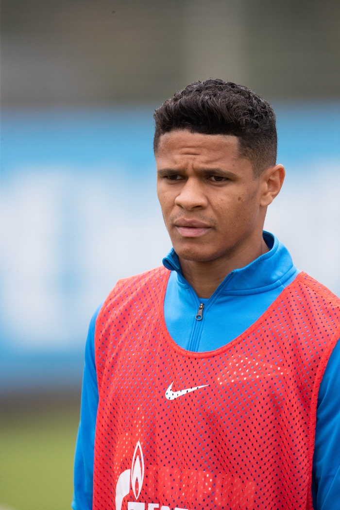 18/07/2019. Россия, Санкт-Петербург, «Газпром»-тренировочный центр. Российская Премьер-Лига 2019/20, 2-й тур, «Сочи» — «Зенит». Открытая тренировка «Зенита» перед вылетом в Сочи.